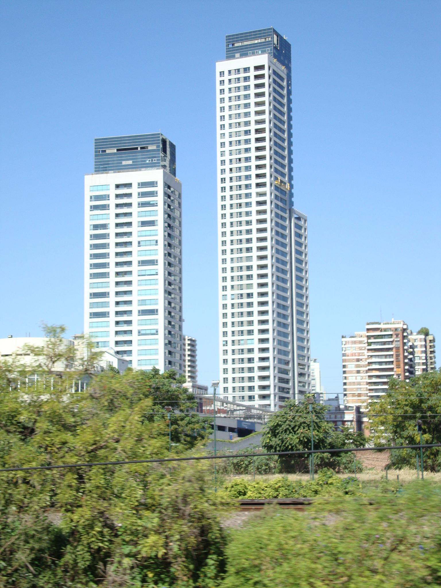 Vista del complejo de Torres Le Parc Figueroa Alcorta en construcción, desde las vías del Ferrocarril General Belgrano (Norte). Buenos Aires, Argentina.